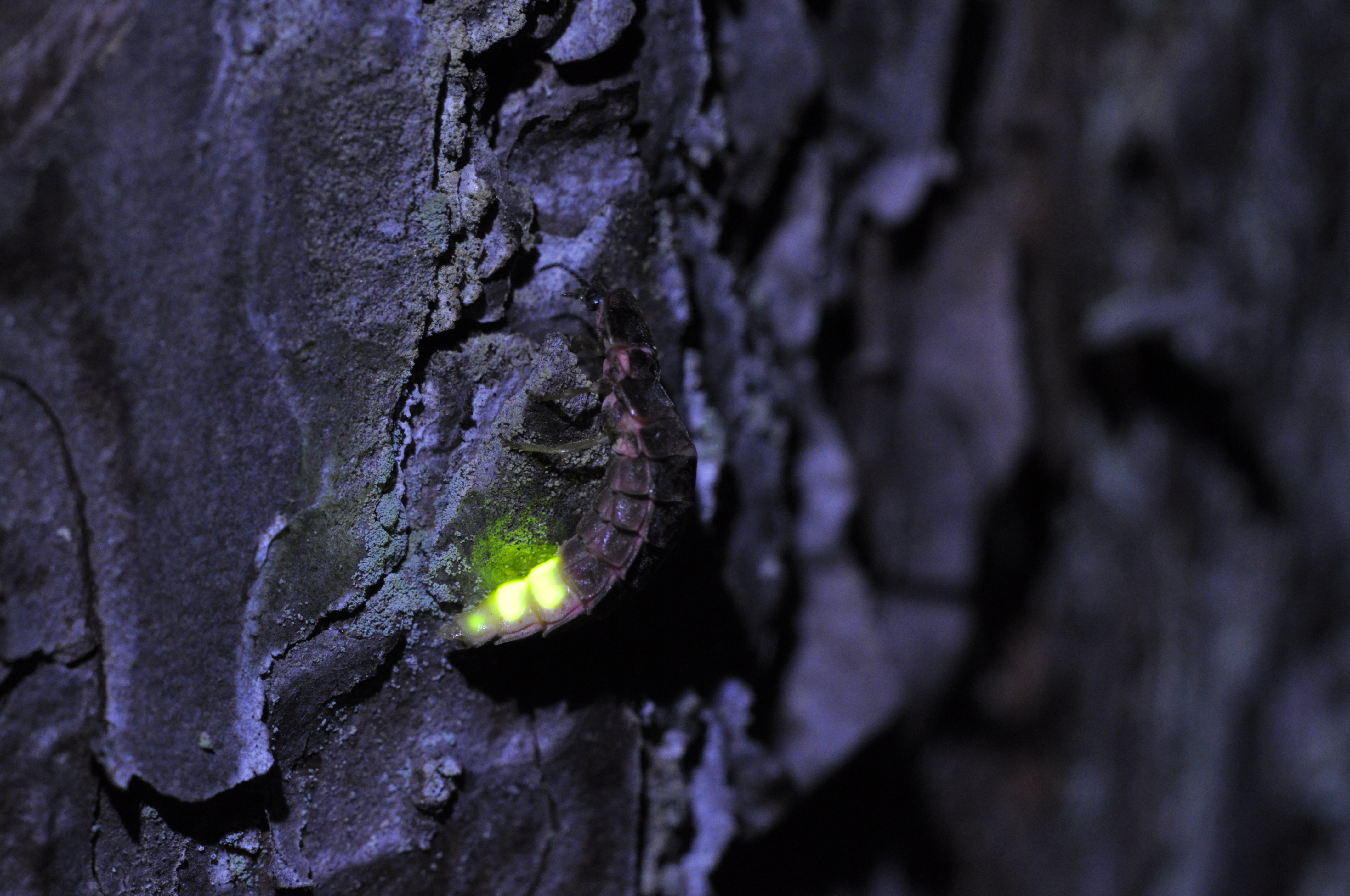 Valgejärve, Põlvamaa